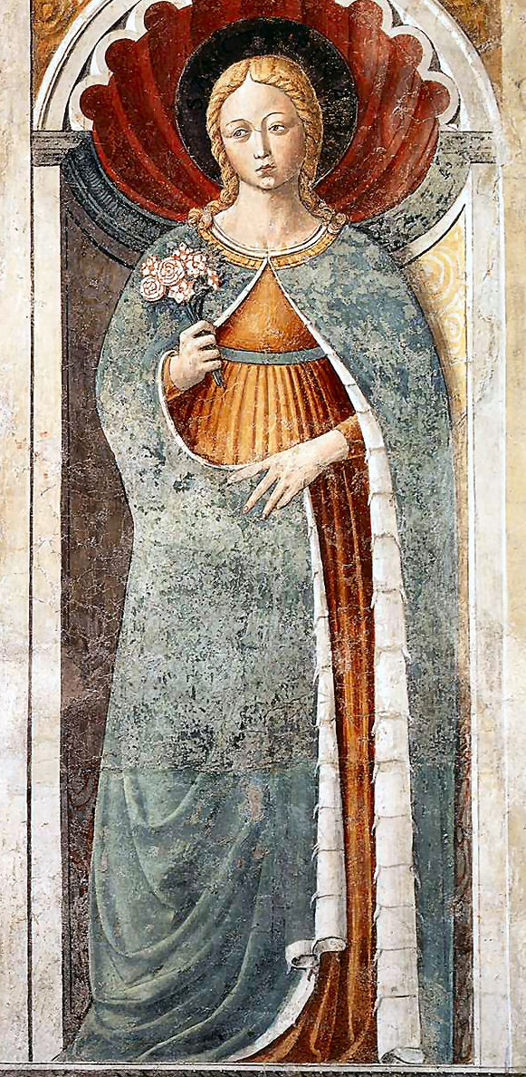 Benozzo Gozzoli, affresco con santa Fina, San Gimignano, chiesa di Sant'Agostino